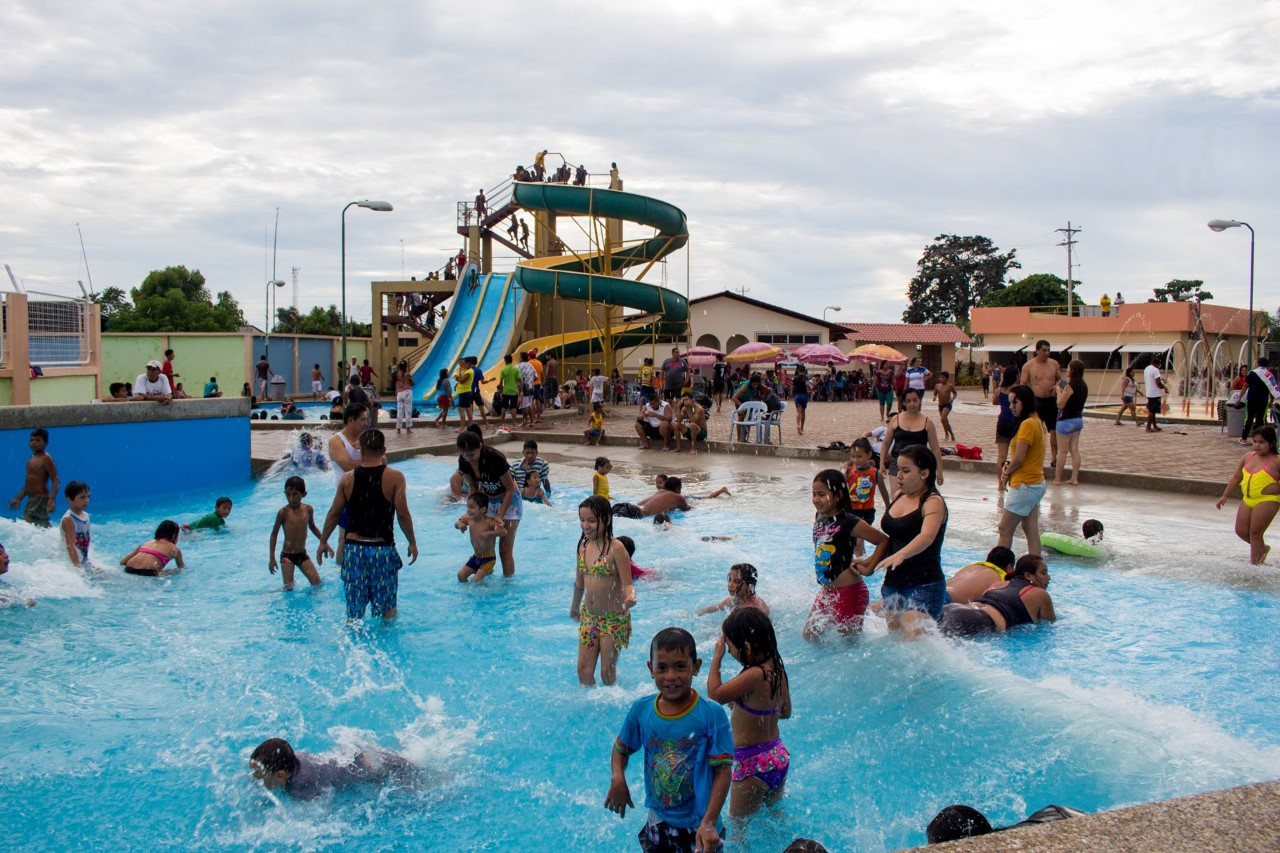 Turistas disfrutando de las piscinas del parque acuático de Balao